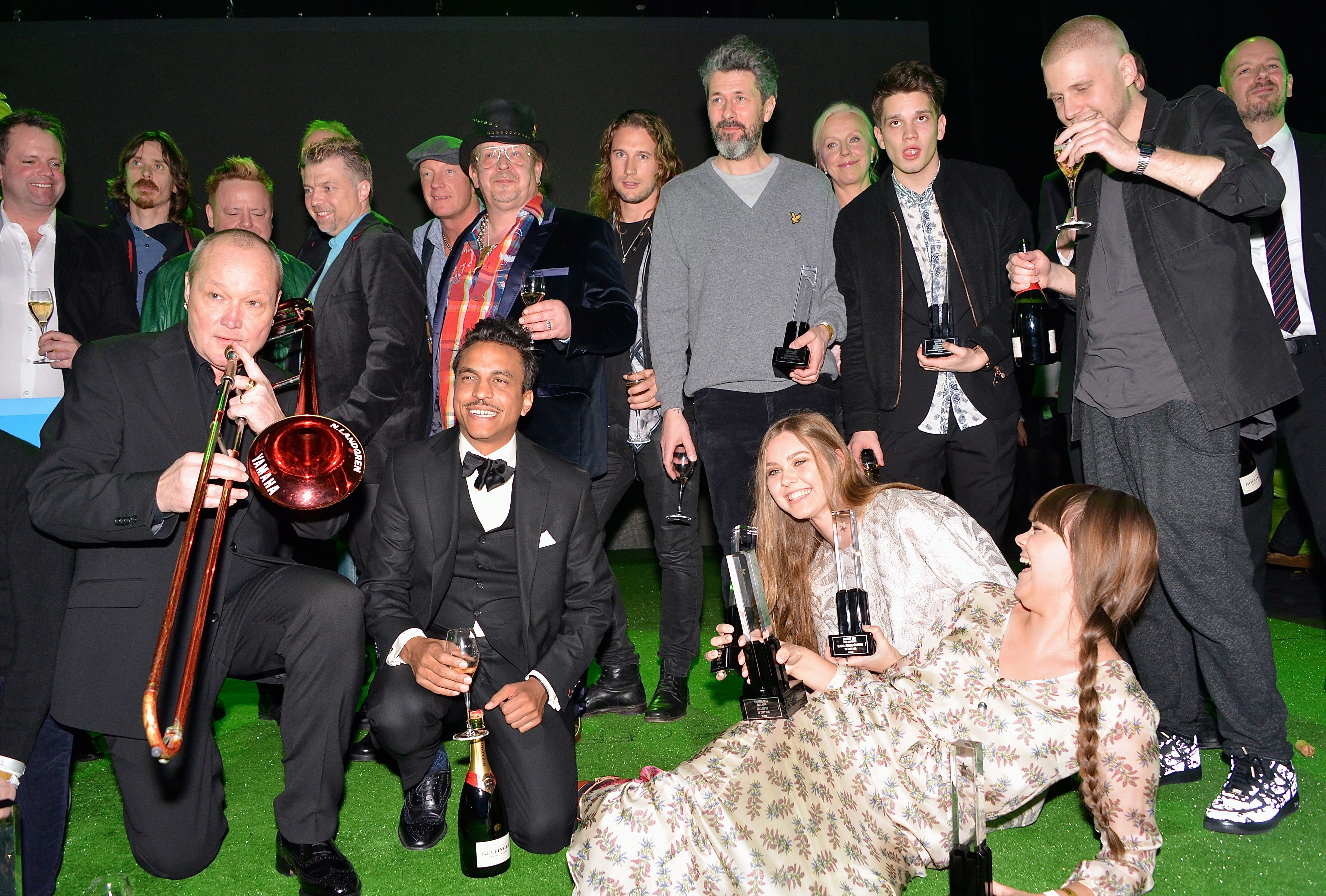 Några Grammisvinnare på Grammisgalan på Cirkus, Stockholm den 20 februari 2013.